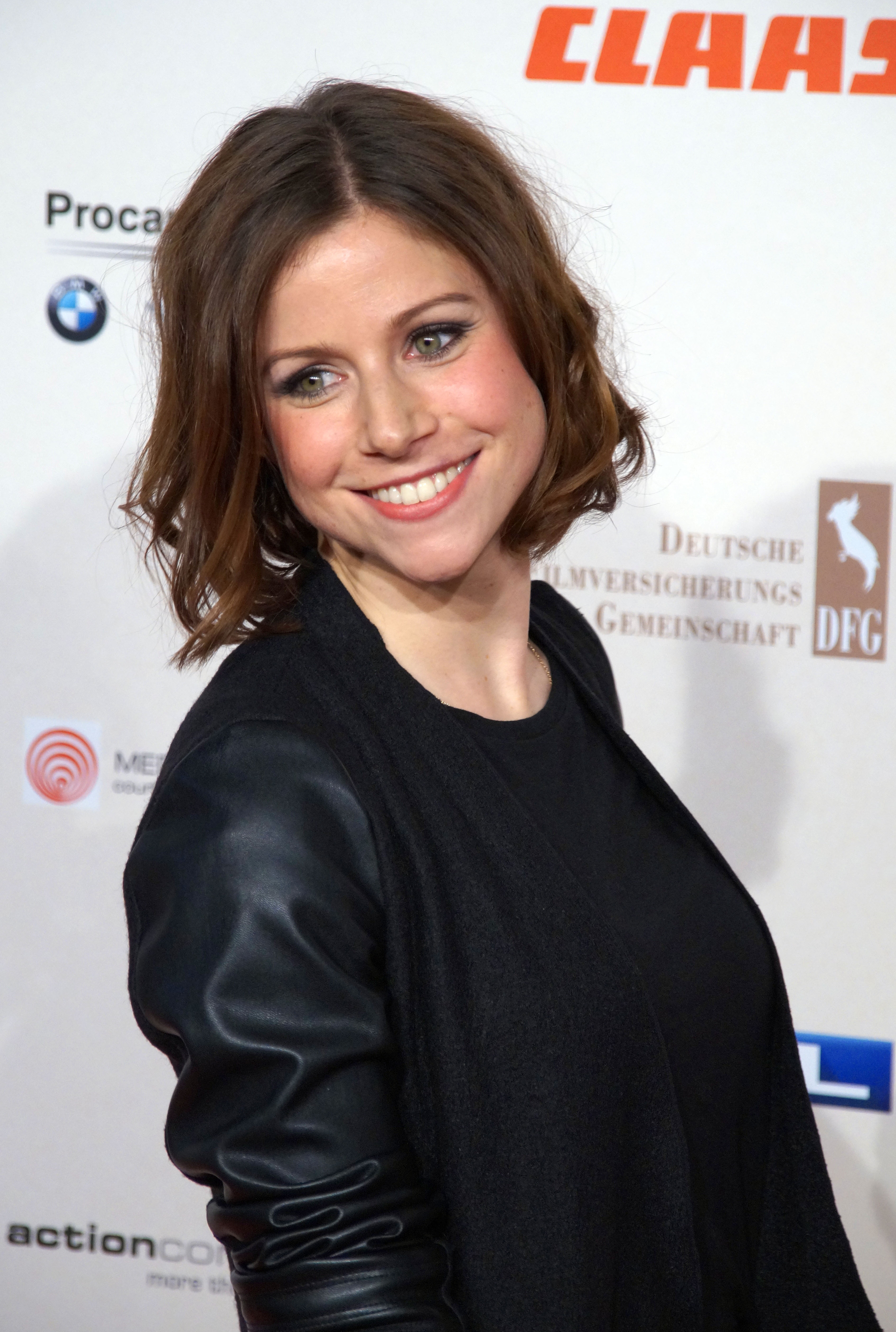 Katrin Heß bei der Premiere von der 300. Folge 'Alarm für Cobra 11', April 2016.